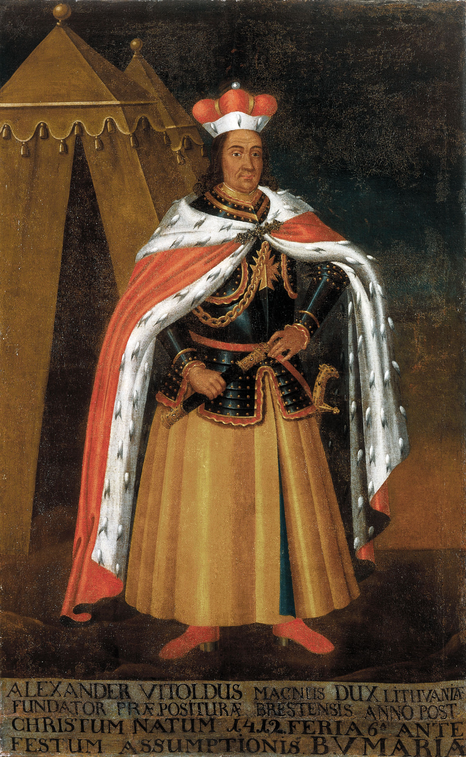 Беларуская (тарашкевіца): Партрэт Вітаўта Вялікага (Vitaŭt Vialiki. Вітаўт Вялікі ) з кляштару аўгустынаў у Берасьці.